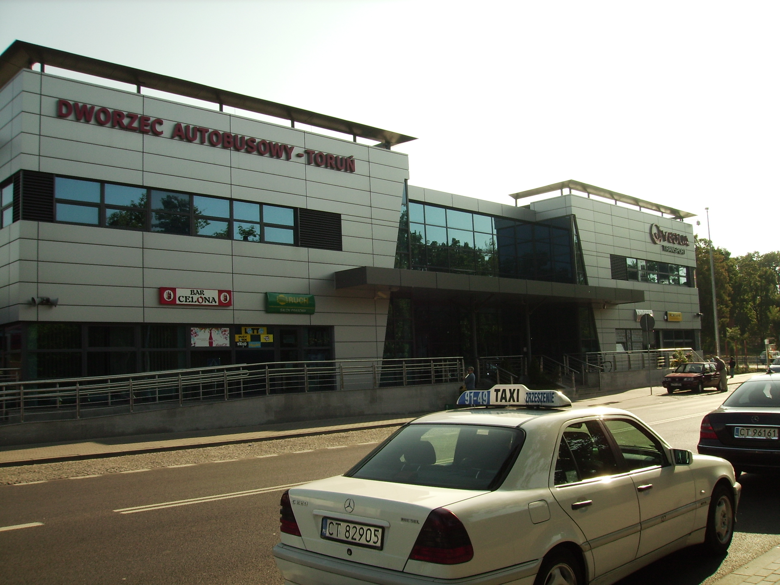 Zakład Veolia w Toruniu. Dworzec autobusowy.